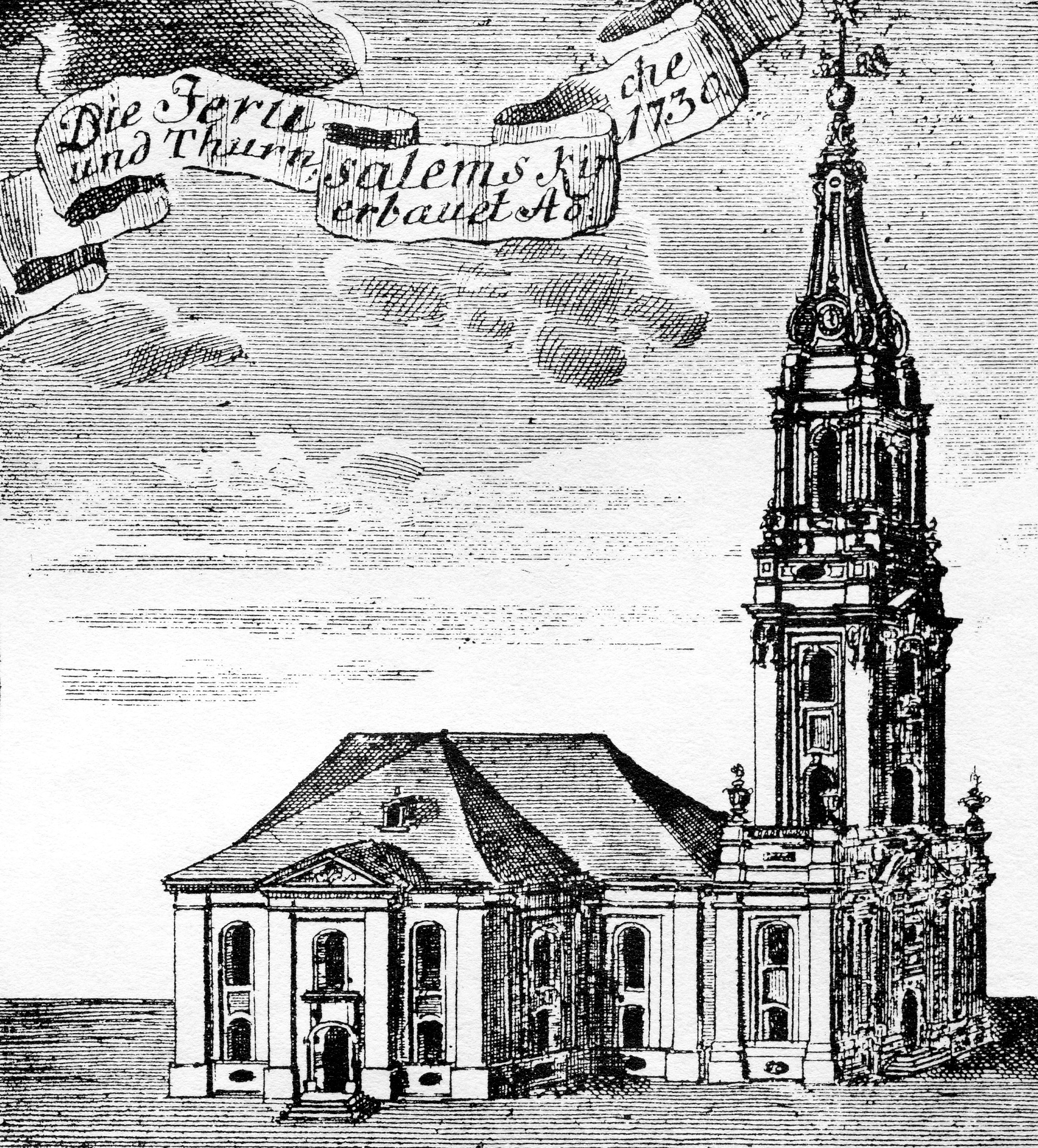 Jerusalemskirche in Berlin-Mitte